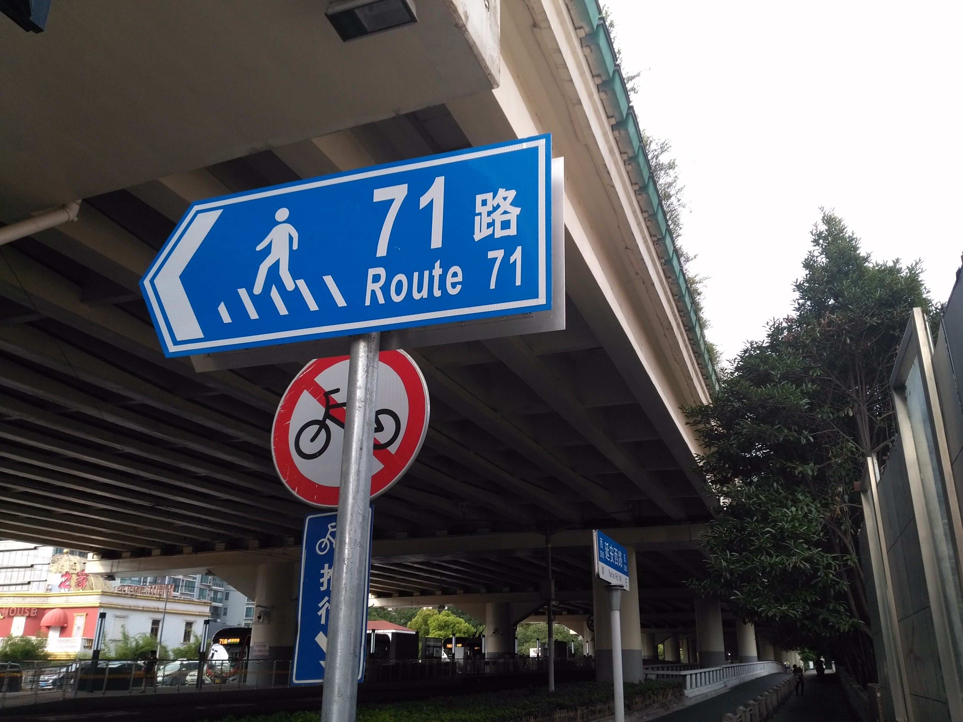 中文（中国大陆）: 延安路中运量公交系统进站指引牌（斑马线）